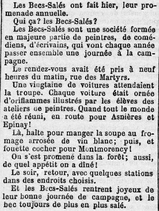 La sortie annuelle à la campagne de la société festive parisienne les Becs-Salés